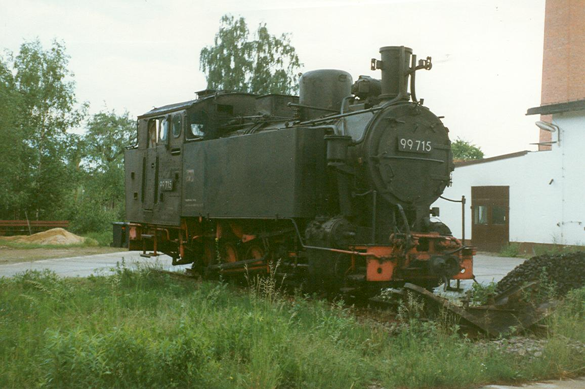 99 715 vor dem ehemaligen Heizhaus des Bahnbetriebswerk Wilsdruff 1993